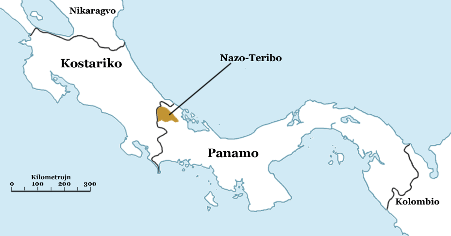 Mapo de la indiĝena regiono Nazo-Teribo.